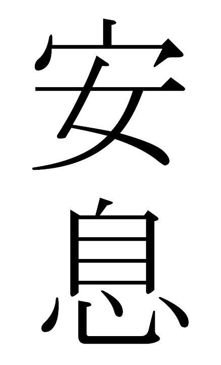 Anxi